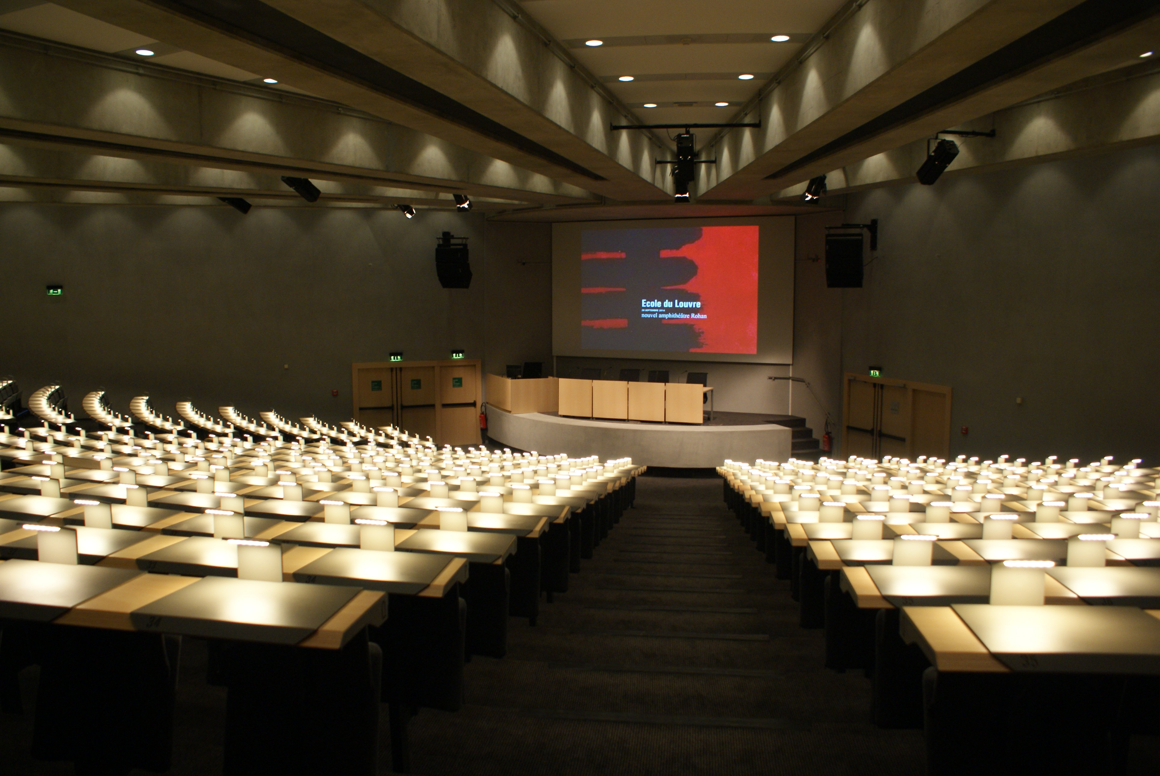 Amphithéâtre Rohan, Carrousel du Louvre, rénové en 2014 par l'architecte Étienne Dufay.